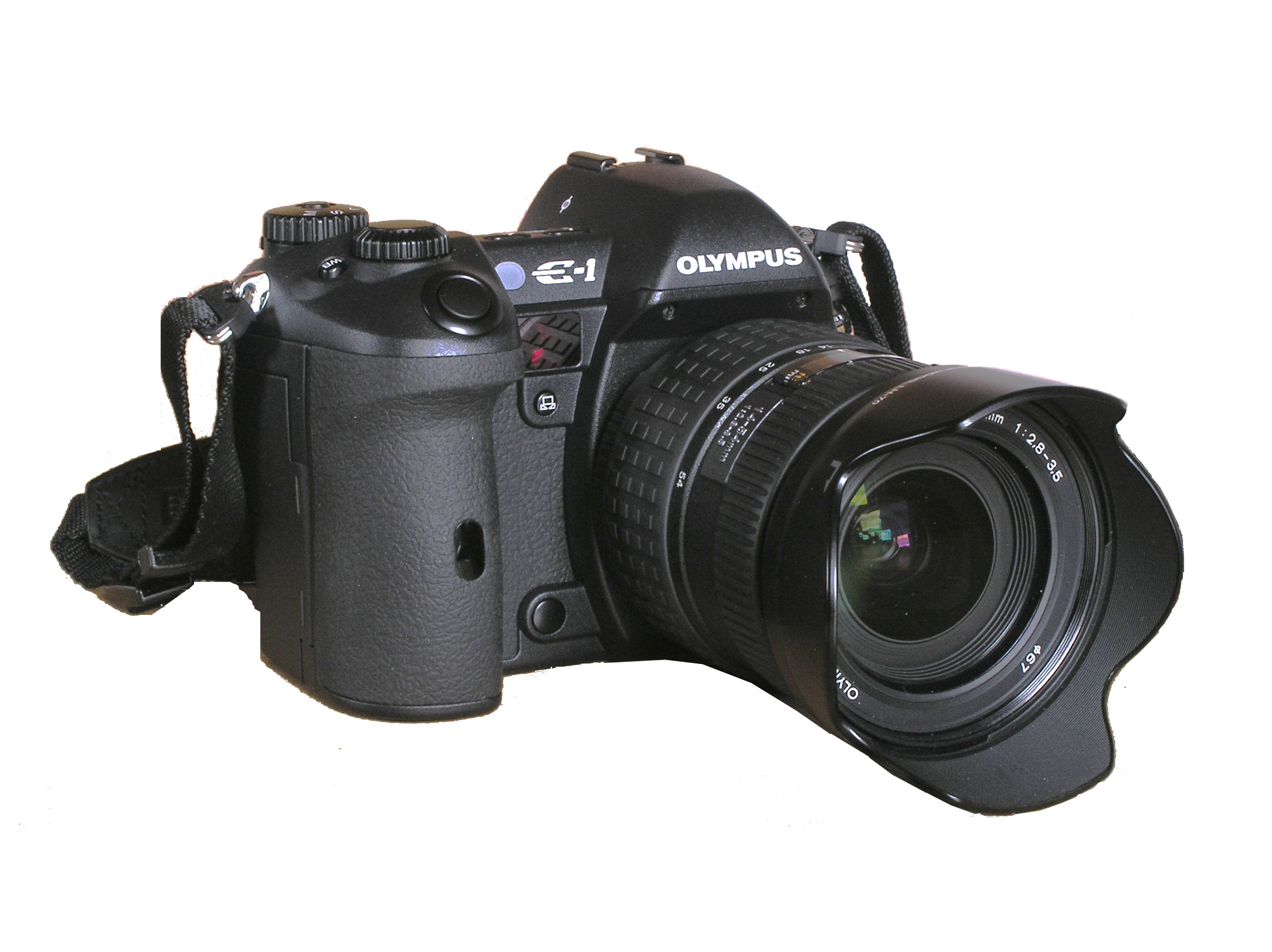 Olympus E-1 von vorne